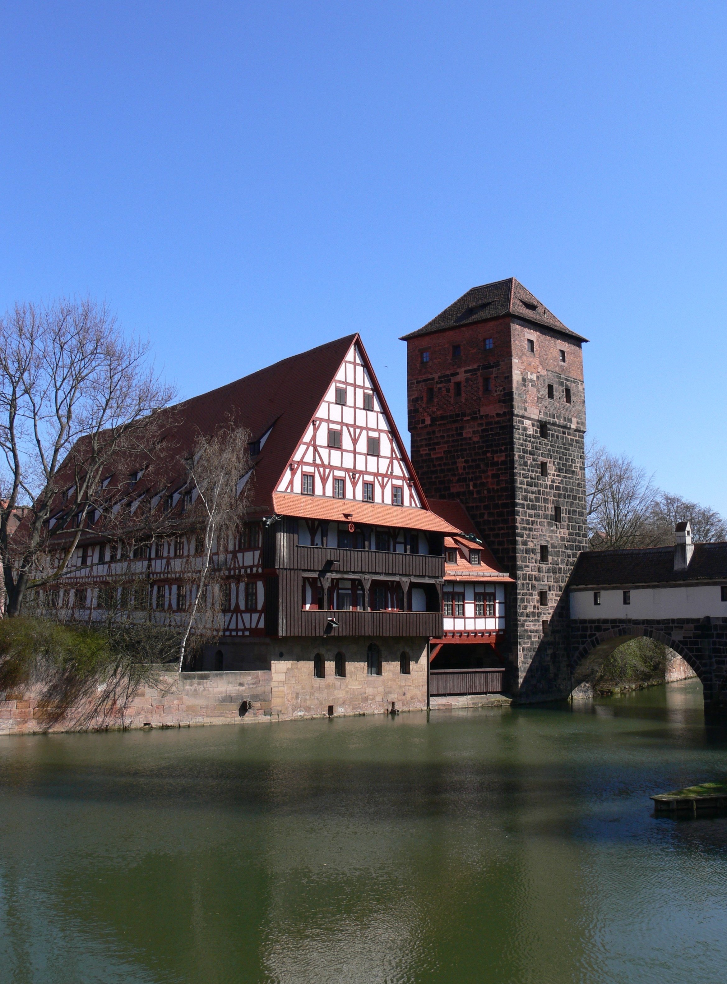 Nürnberg, Wasserturm und Weinstadel